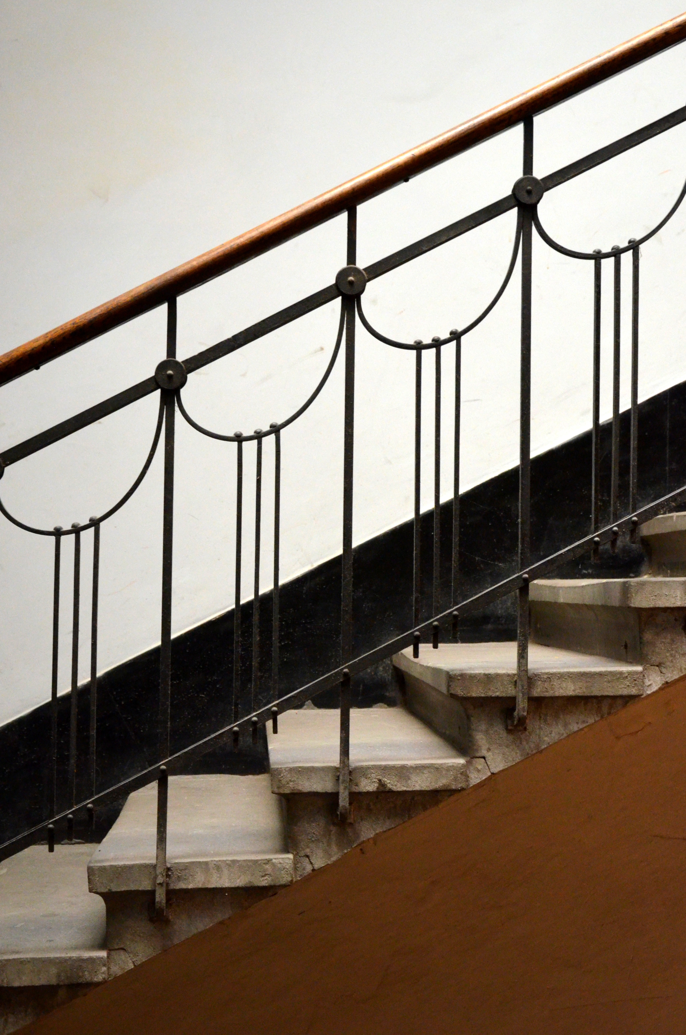 Будинок № 1c на вулиці Пекарській у Львові.